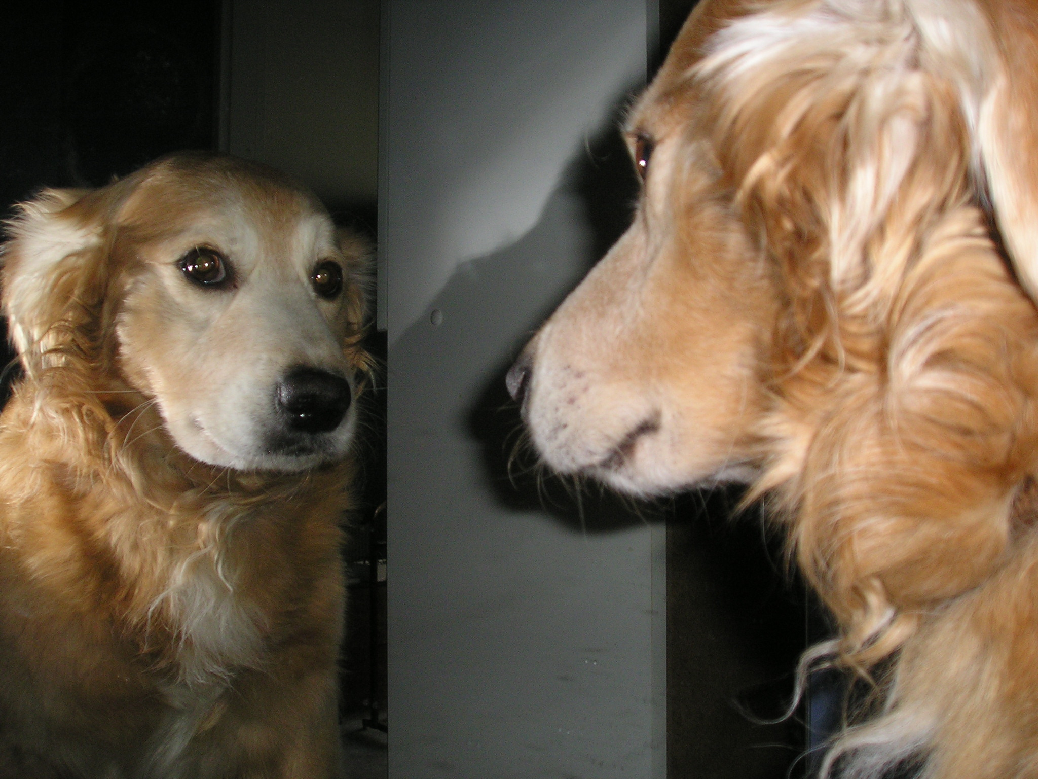 NICO looks at himself